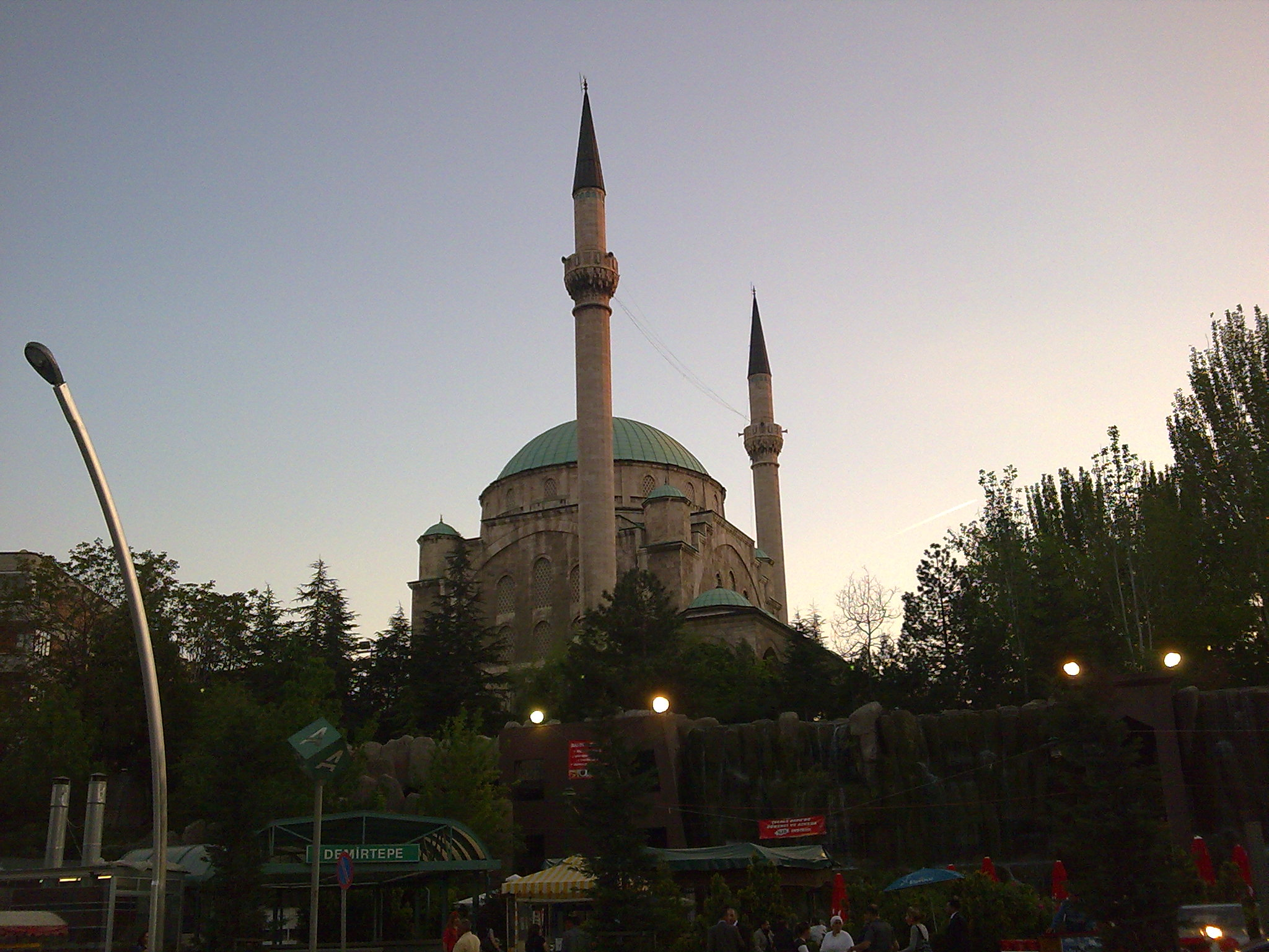 Maltepe Camii'nden bir görünüm. Sol altta Ankaray istasyonlarından Demirtepe istasyonu görünmekte. Ayrıca fotoğrafta görünmemekle beraber Demirtepe istasyonunun hemen önünden Tandoğan ile Kızılay'ı birbirine bağlayan Gazi Mustafa Kemal Bulvarı geçmektedir. Camiinin öte tarafından Malltepe Park Alışveriş Merkezi bulunmaktadır.